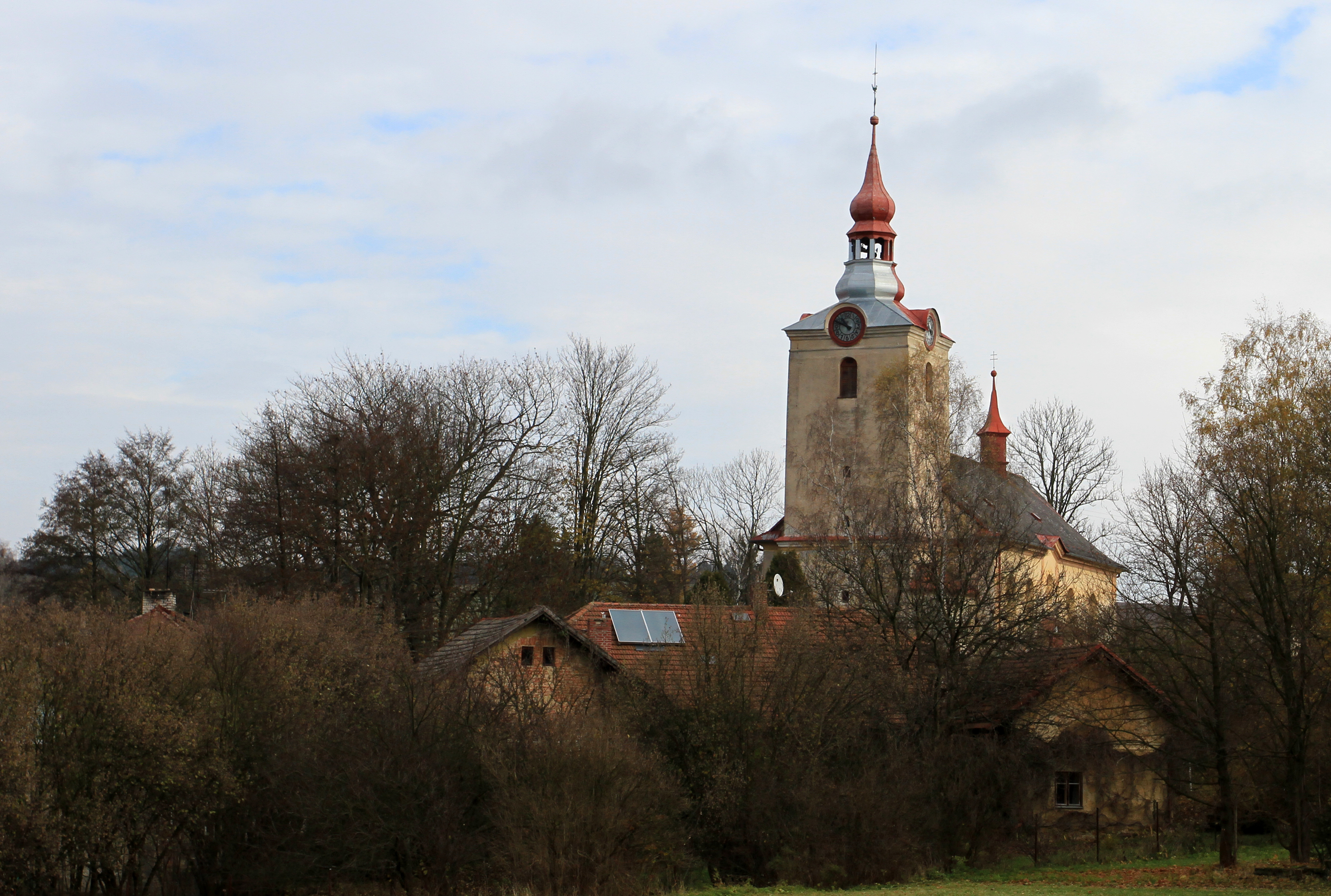 Kostel sv. Jiří (Dolní Čermná), Dolní Čermná